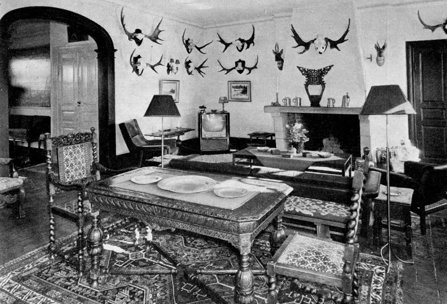 Hedensö herrgård, hallen